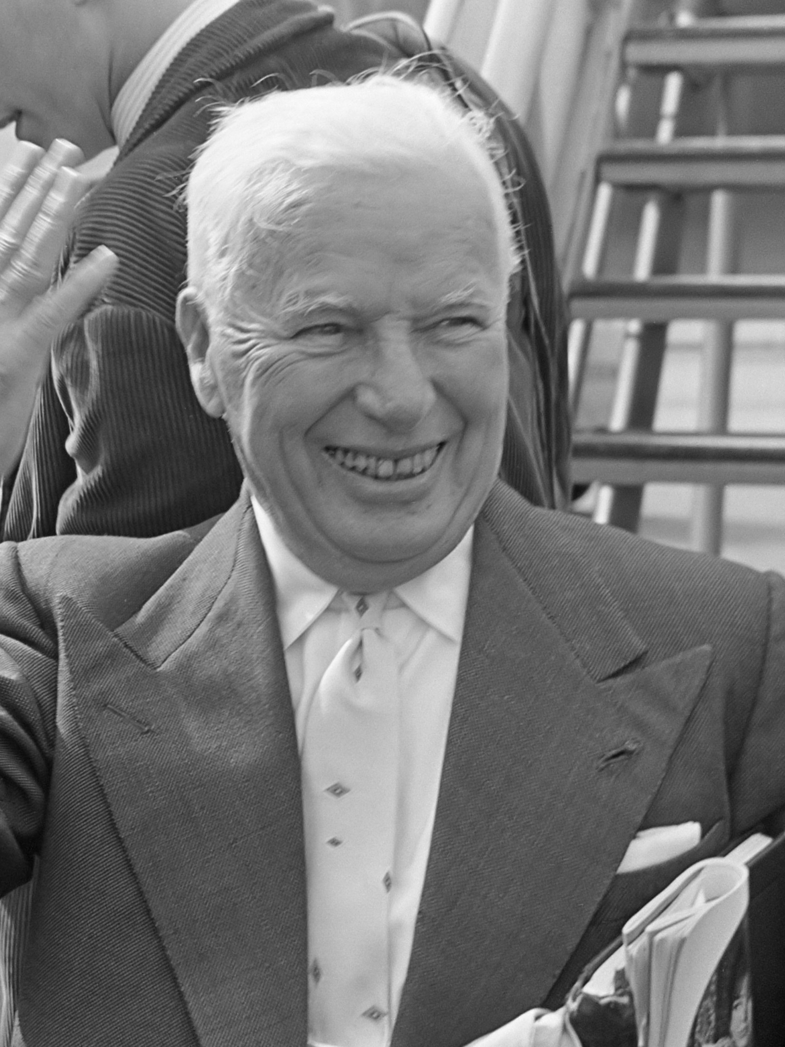 Aankomst van acteurs Charlie Chaplin en Peter Ustinov en hun echtgenotes op Schiphol. Aankomst Charlie Chaplin en echtgenote Oona O'Neill 23 juni 1965